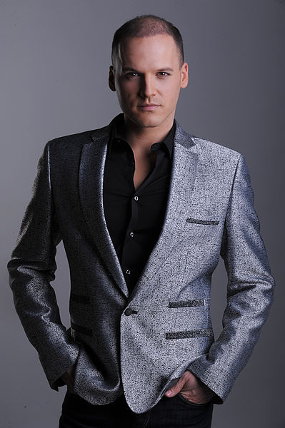 André Vásáry, Budapest